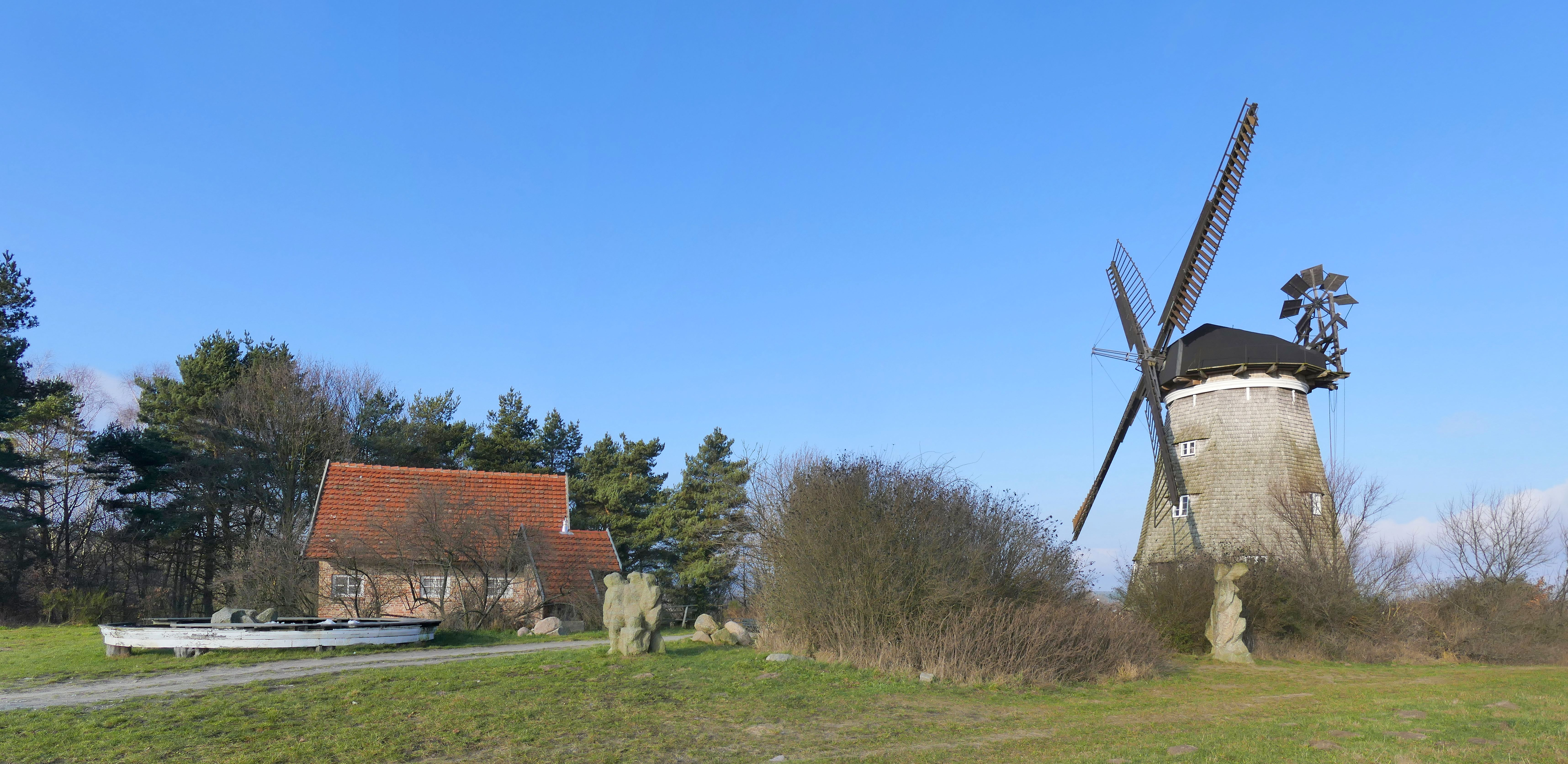 Windmühle Benz, Skulpturen von Sabine Teubner